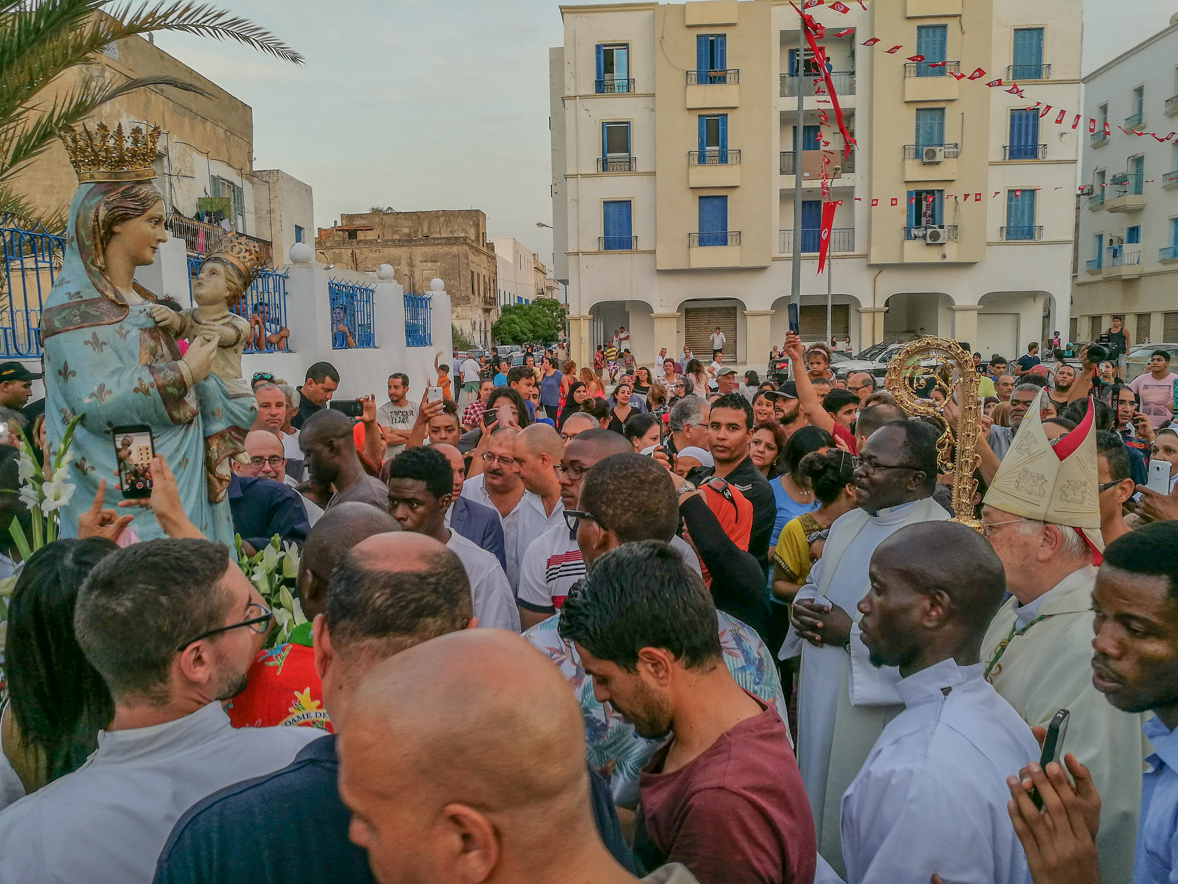 Premiere Assomption du 15 Août de la vierge de Trapani à la Goulette depuis 1960